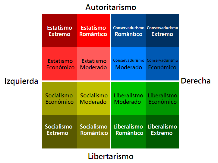 Principales sistemas políticos en el mapa político.